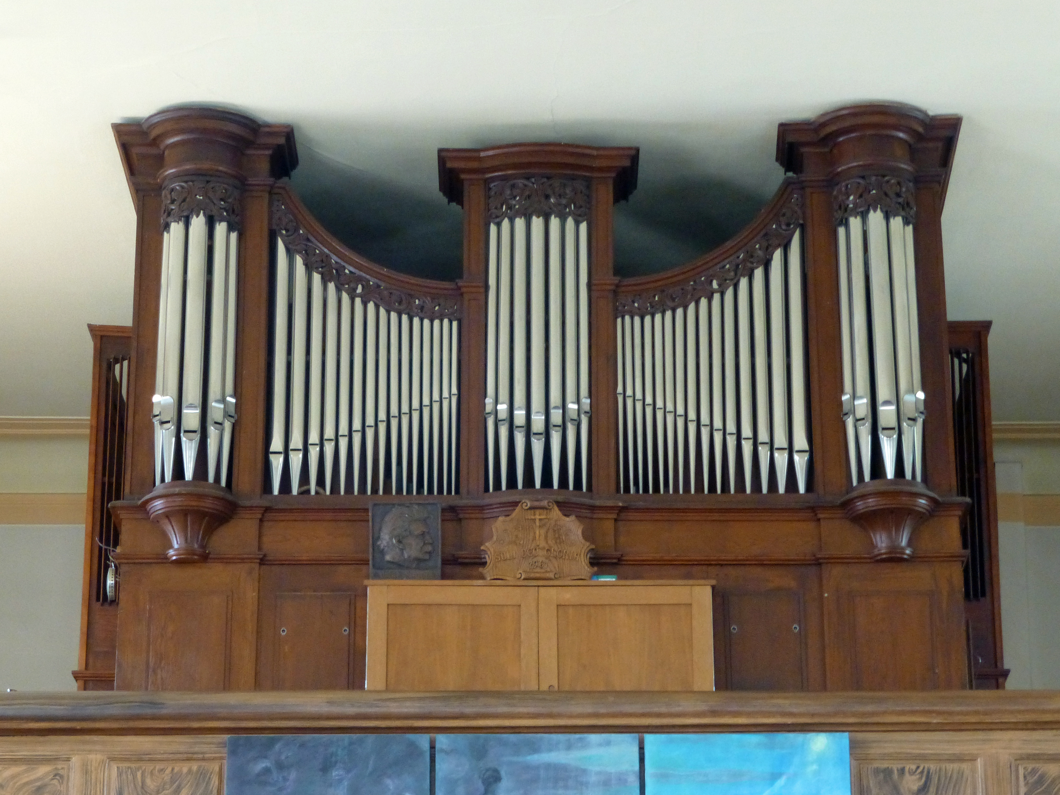 Église simultanée de Gunsbach (Haut-Rhin), reconstruction, dans le buffet de l'orgue de Valentin Rinkenbach père, de la partie instrumentale par Alfred Kern en 1961, sous l'égide d'Albert Schweitzer.